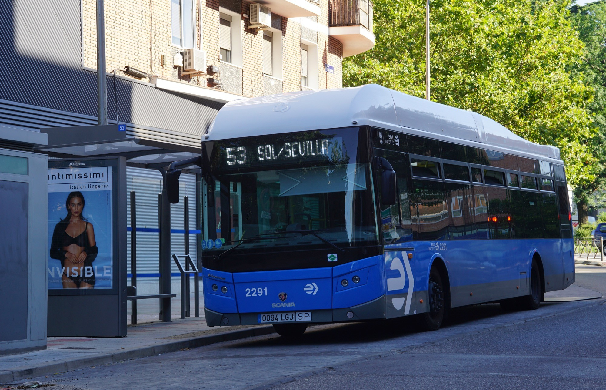 53 EMT Madrid final de Arturo Soria en la calle López de Hoyos, agosto 2020